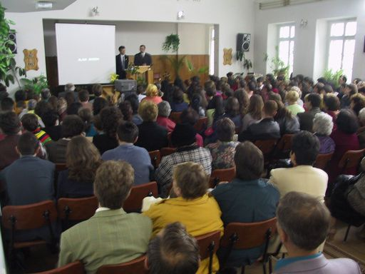 Евангелизация на Църквата на адвентистите от седмия ден в гр. Добрич (2001 г.)